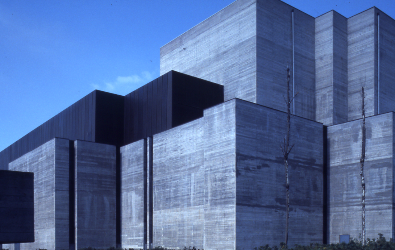 Servizio fotografico : Bologna, 1976 / Paolo Monti. - Foglio: 1, Fotogrammi complessivi: 20/20 : Diapositiva, sviluppo cromogeno/ pellicola ; 35 mm. - ((Sullo chassis della diapositiva n. 01 iscrizione manoscritta "Bo/ Fiera". - Nel contenitore 316/330D tra i fogli in pvc contenenti le diapositive ritaglio di stampa fotografica con al verso iscrizione manoscritta: ""Bologna/ Fiera/ Interni ed esterni". - Occasione: Documentazione per la pubblicazione: Renzi Renzo, "Storia dei luoghi della città di Bologna", Bologna, E.P.T., 1976. - Fonte: Rubrica di Paolo Monti: Diapositive 24x36mm (1948-1982), presso Archivio Paolo Monti. Rubrica con elenco soggetti e numeri di inventario (da 1 a 1000) corrispondenti ai fogli a tasche in pvc in cui sono contenute le diapositive. - Fonte: Monografia di Renzi, Renzo: Storia dei luoghi della città di Bologna, Bologna, E.P.T. (1976). - Fonte: Agenda di Paolo Monti: Monti - Agenda 1976 (1976/00/00), presso Archivio Paolo Monti